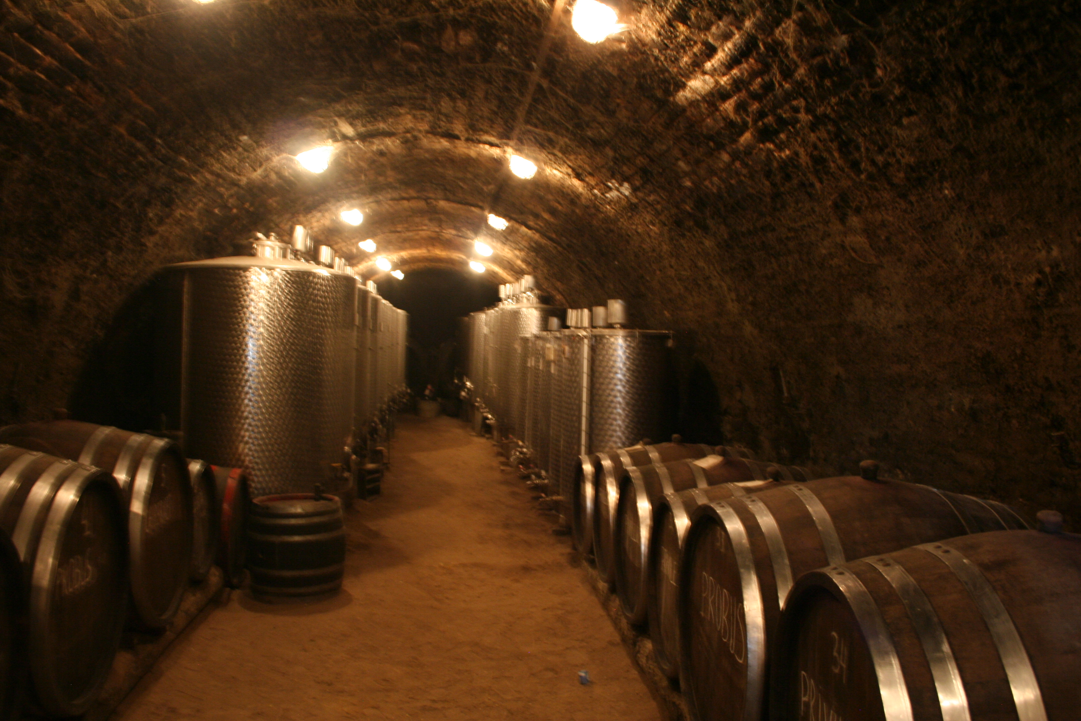 Vinska kuća Živanović